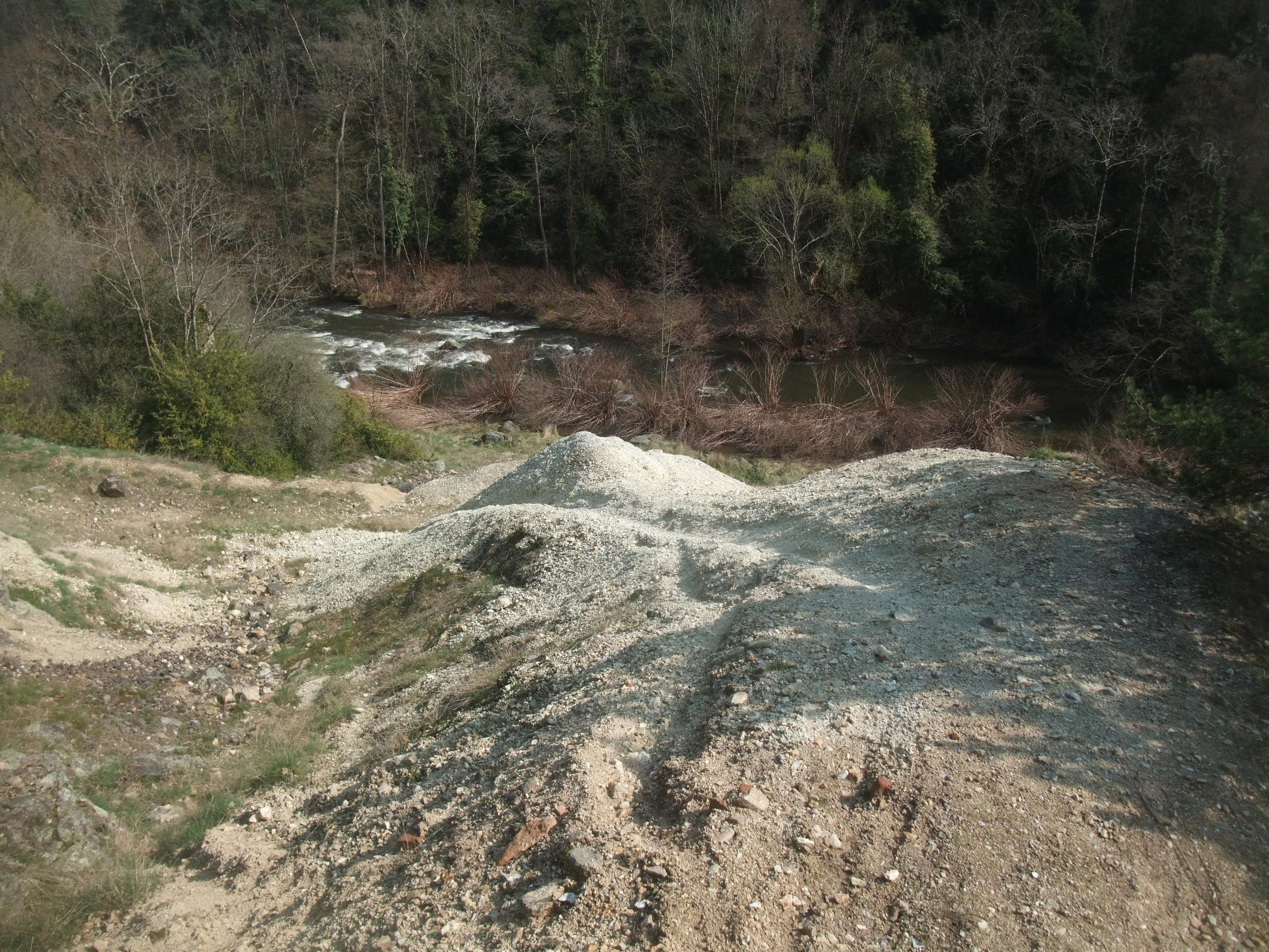 Talencieux mine dépots